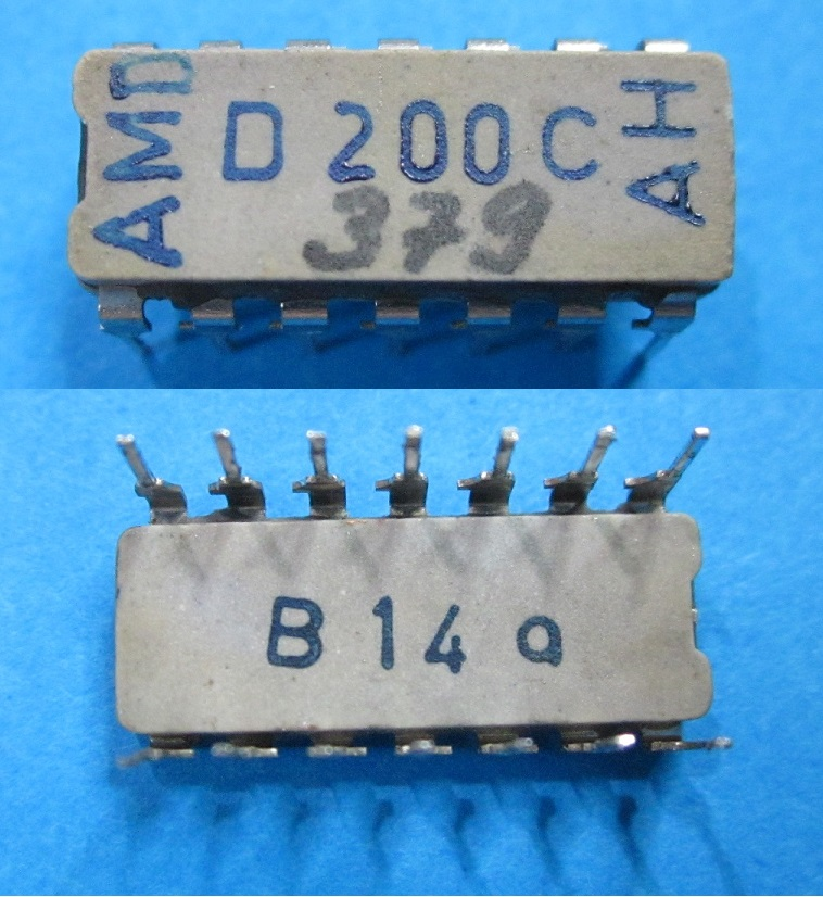 Integrierter Schaltkreis D200C (entspricht 74H00), hergestellt von der Arbeitsstelle für Molekularelektronik Dresden (AMD), August 1970